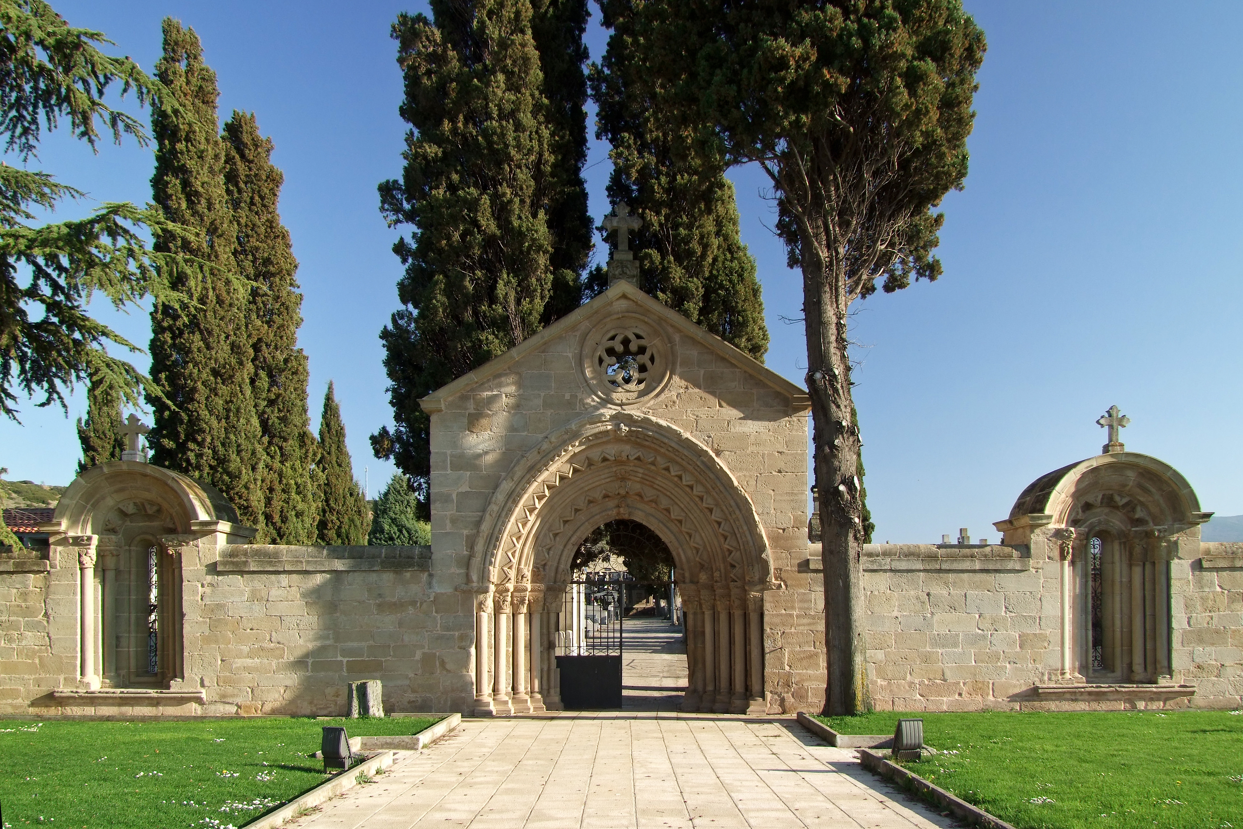 Portada del cementerio hecha con los restos del hospital de San Juan de Acre en la localidad de Navarrete, La Rioja - España